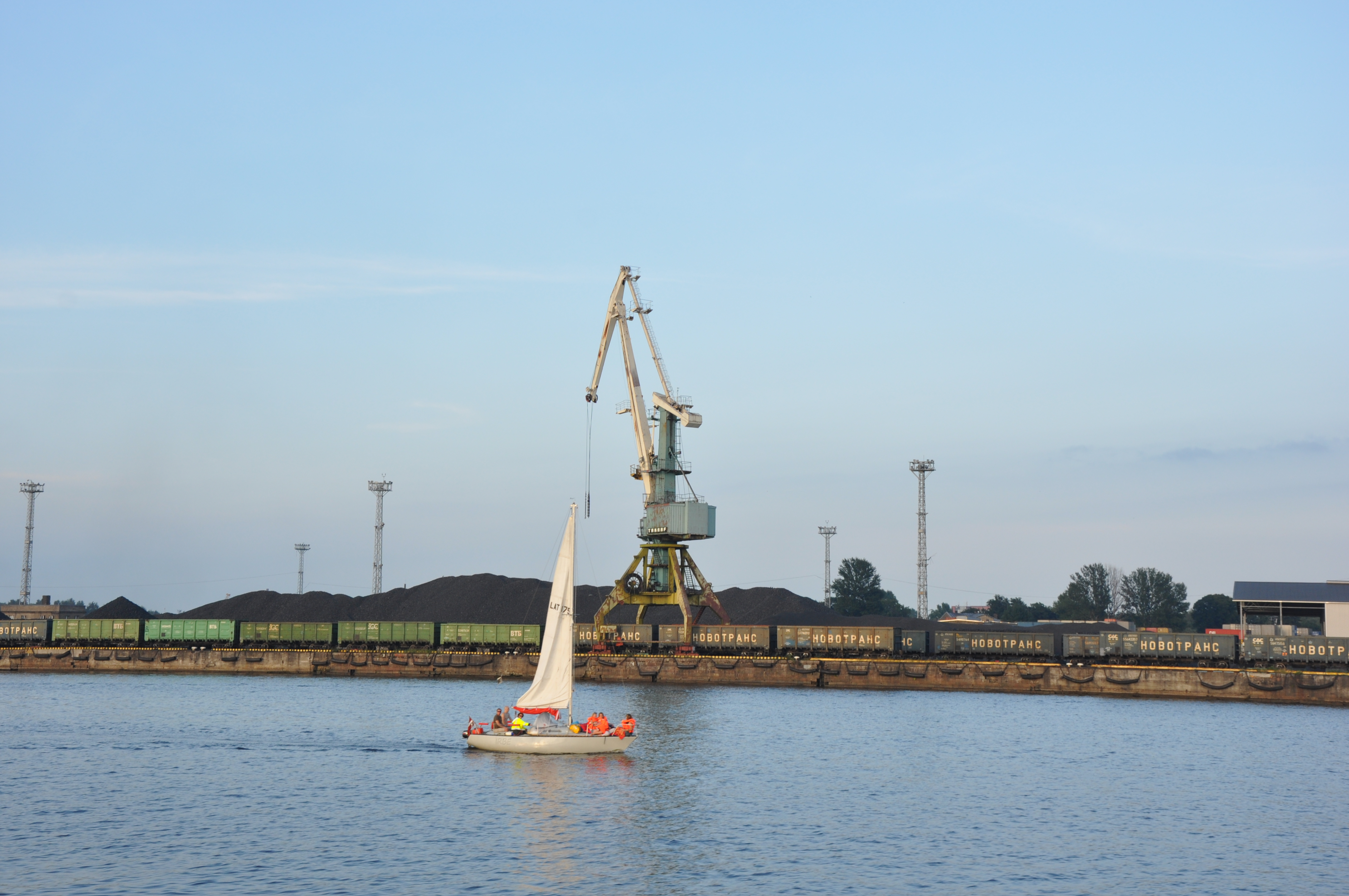 Balta bura ogļu kalnu fonā, "Irbe"; Rīga, Latvia